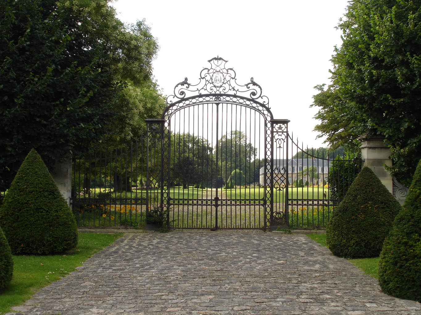 La grille du château d'Arnouville-lès-Gonesse (Val-d'Oise), France